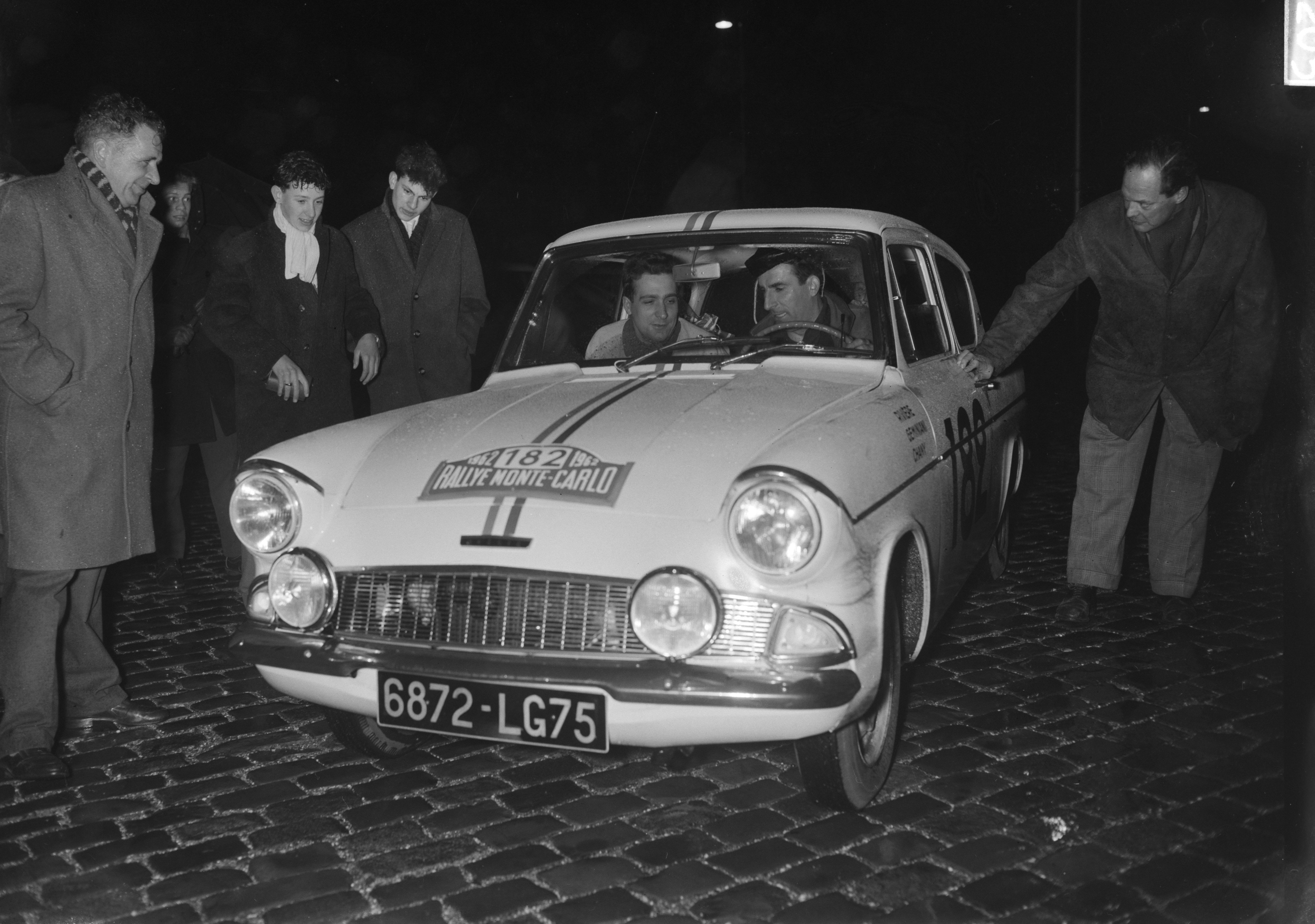 Roger Rivière et Raphaël Géminiani dans leur voiture de course engagée sur le Rallye automobile Monte Carlo 1962